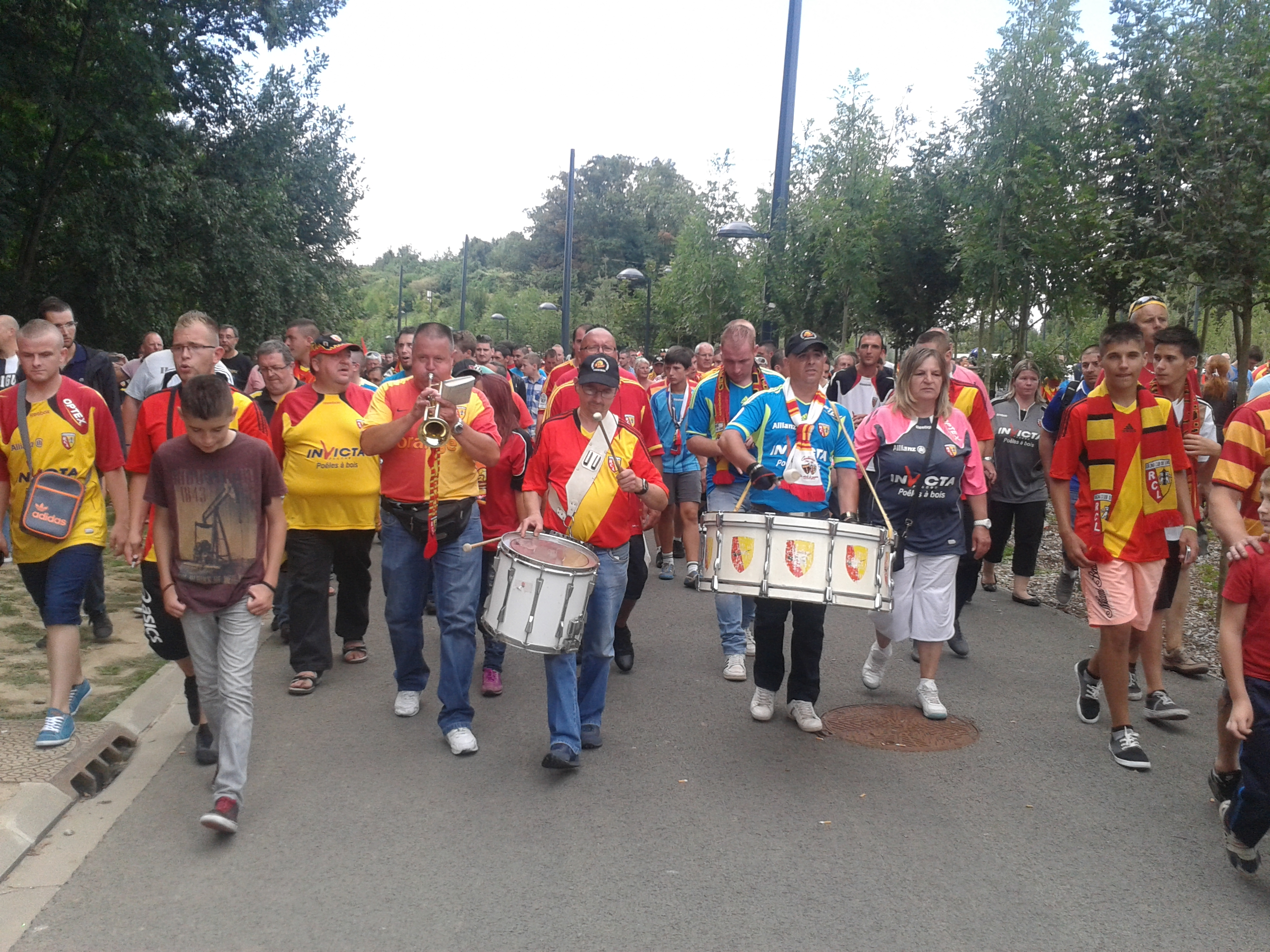 Orchestre jouant après le match RC Lens - AJ Auxerre, le 17 août 2013, au Stade Bollaert-Delelis, pour le championnat de France de football de Ligue 2 (deuxième division française).